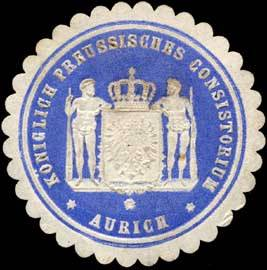 Sealing stamp Title: Königlich Preussisches Consistorium Aurich Description: blau, weiß, geprägt Place: Aurich size: 4 cm